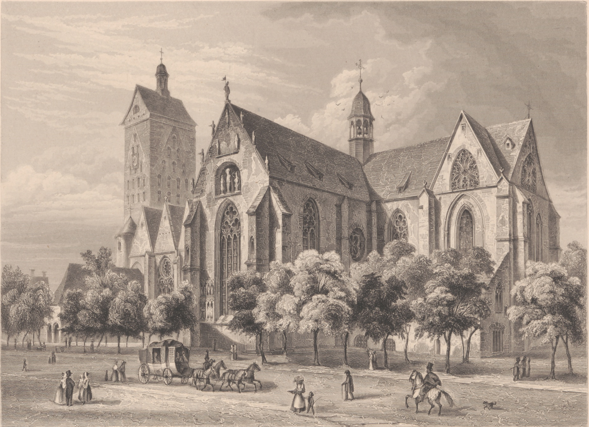 Die Domkirche zu Paderborn